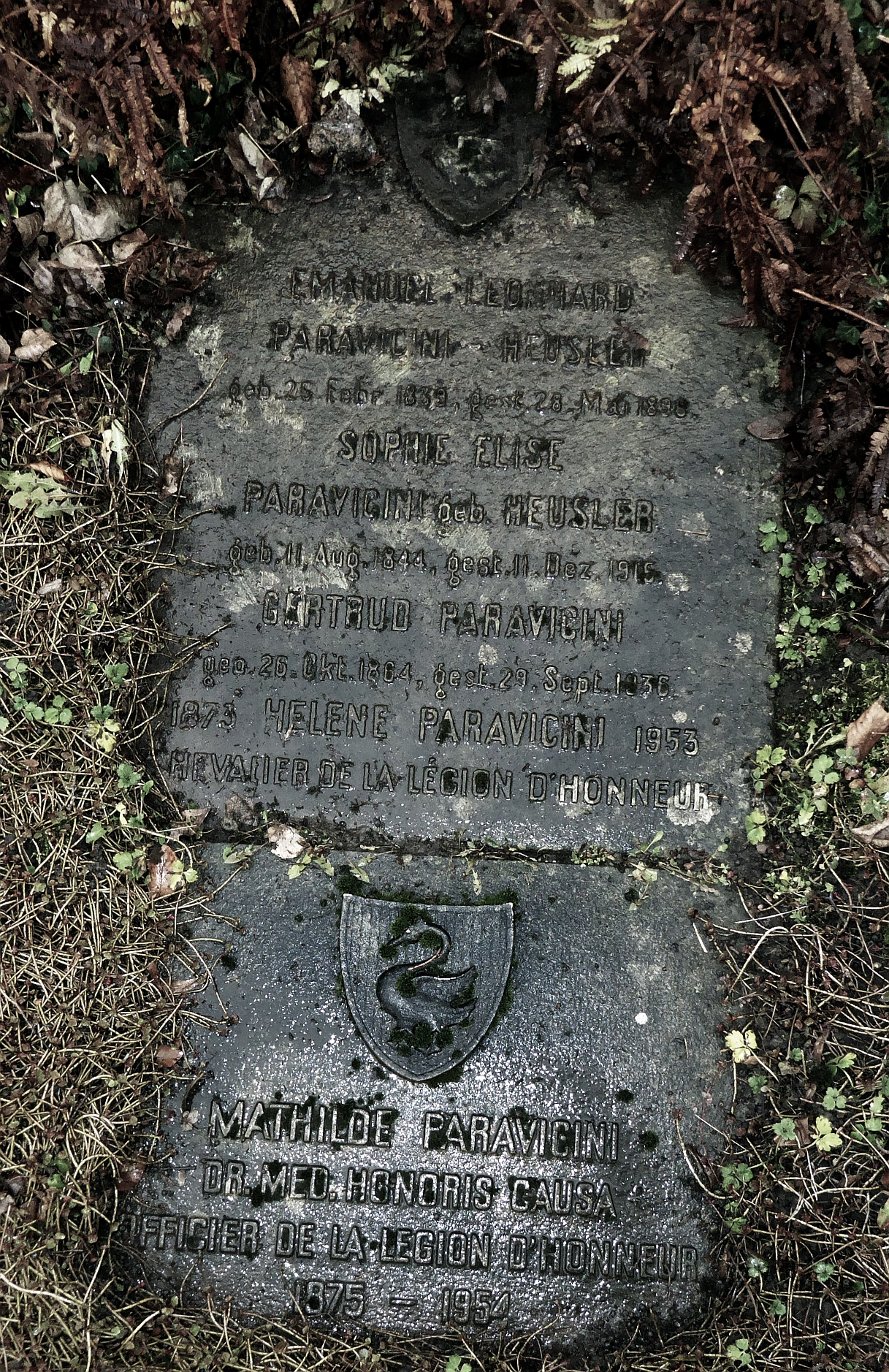 Familiengrab von Mathilde Paravicini (1875–1954) Humanistin, Philanthropin, Pionierin der Kinderzüge, Dr. h. c.,u.a Auszeichnung mit dem Orden der Ehrenlegion, Grab auf dem Friedhof Wolfgottesacker, Basel